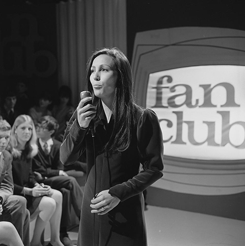 Julie Felix in het televisieprogramma Fanclub